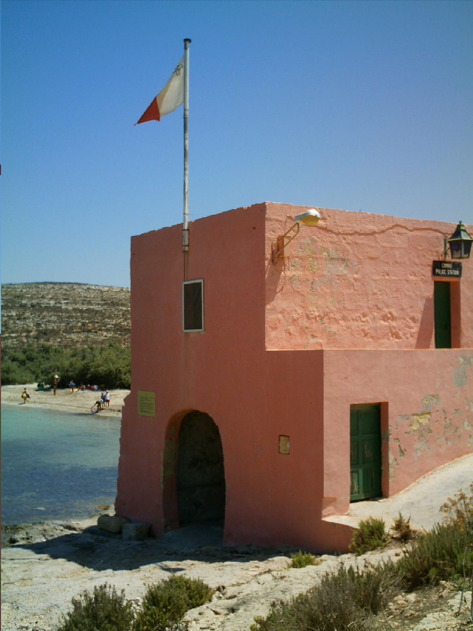 Estación de policía de la isla de Comino (Malta).